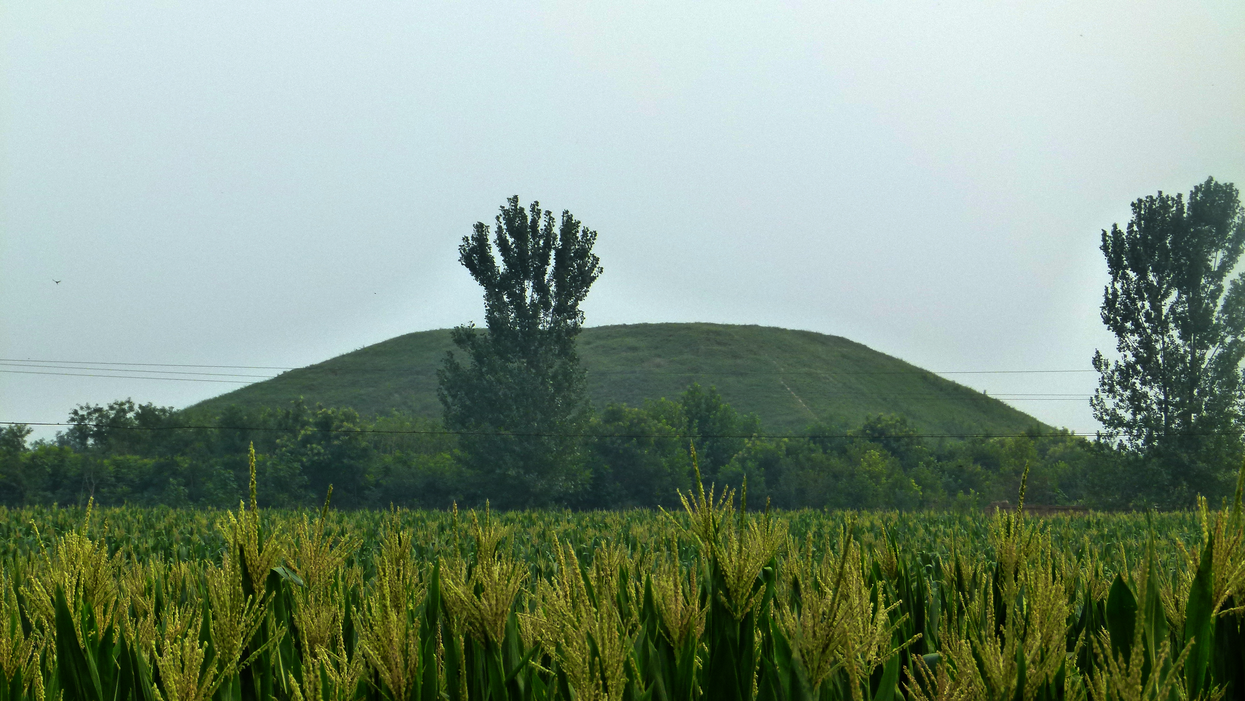 Weiling - Grab der Kaiserin